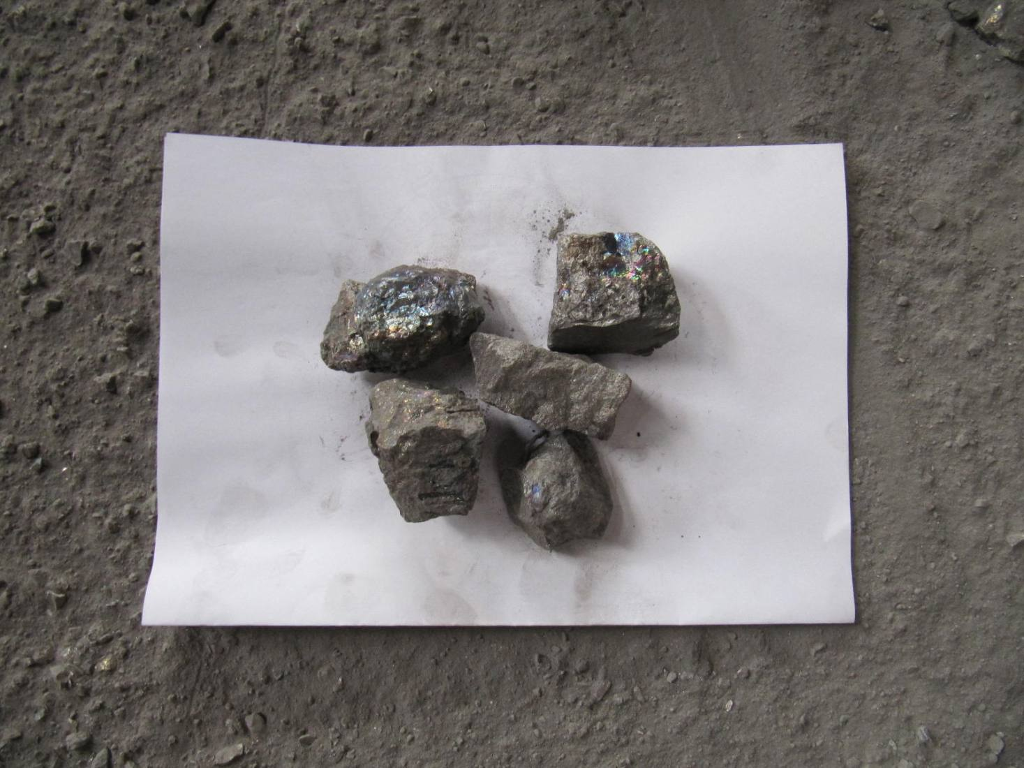 Echantillons de ferromanganèse métal, utilisés en sidérurgie (posés sur feuille A4)